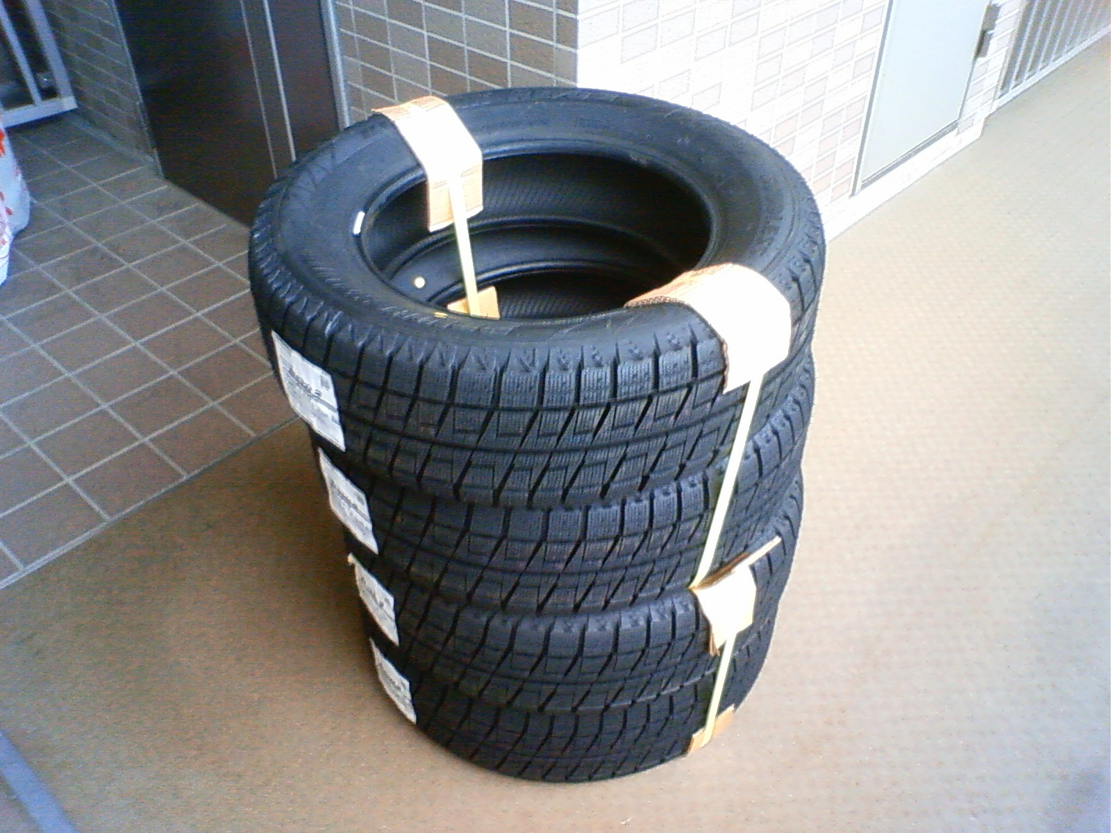 ブリジストンのスタッドレスタイヤ、Blizzak Revo 2